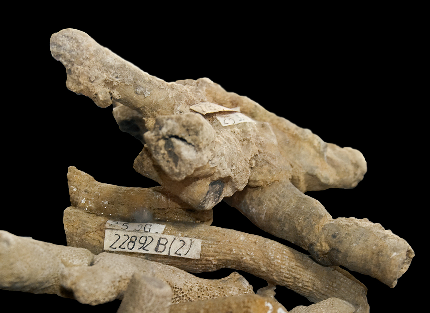 Babes Bolyai paleontology museum